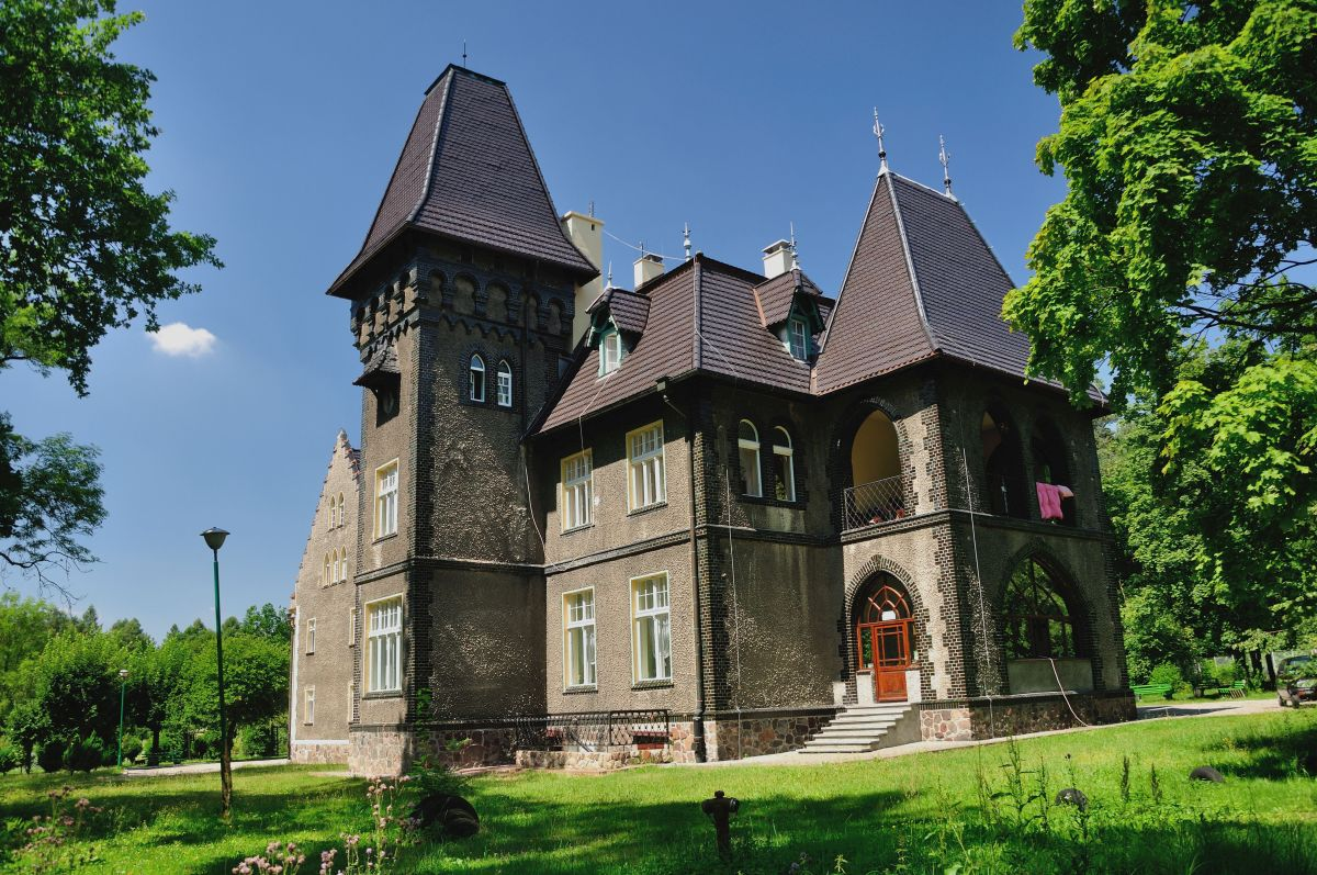 Chróścin Zamek